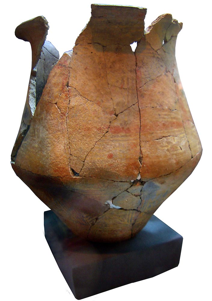 Gran vaso de cerámica pintada bicónica de los inicios de la Edad del Hierro en la Meseta española, Facies Soto de Medinilla. Fue hallada en el yacimiento del castro de La Mota en Medina del Campo (provincia de Valladolid, España). Se conserva en el Museo Arqueológico de Valladolid